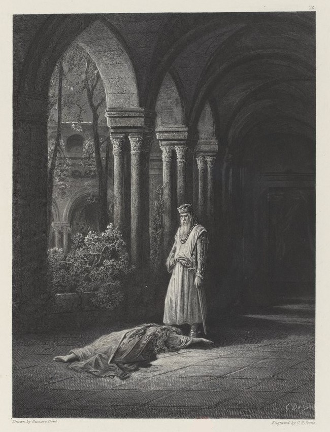 "Il s'arrêta; la Reine se traîna quelque peu vers lui, elle mit ses mains autour des pieds de son époux", dessin de Gustave Doré pour illustration du poéme "Genièvre" de Alfred Tennyson